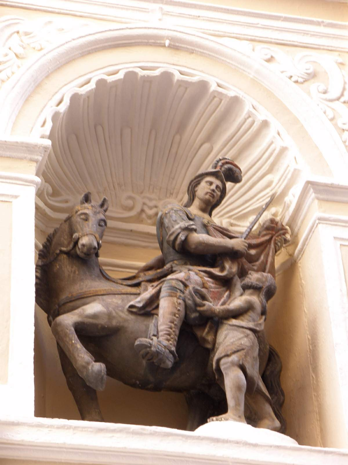 Pamplona - Capilla de San Martín